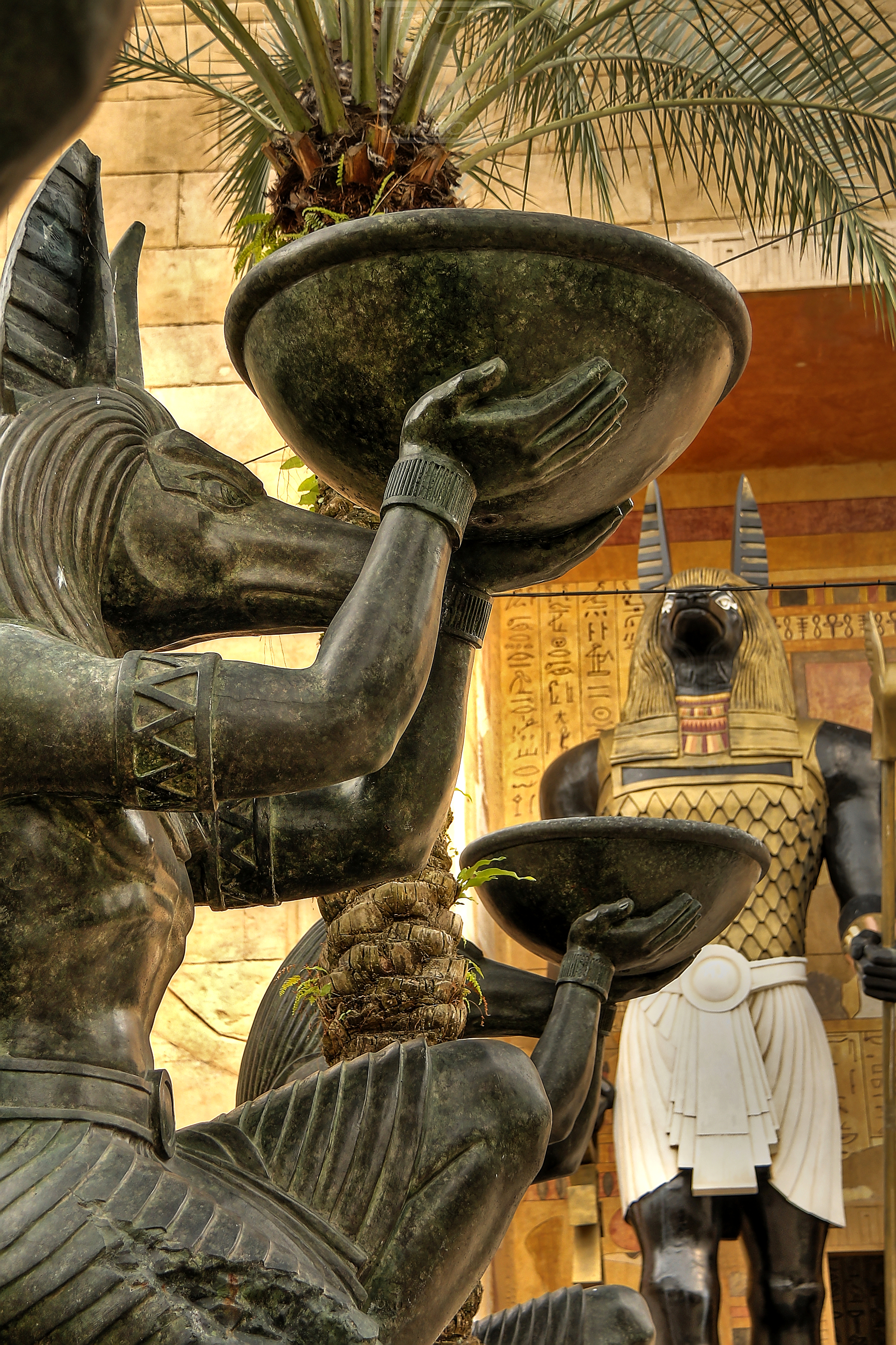 bendonknees_01